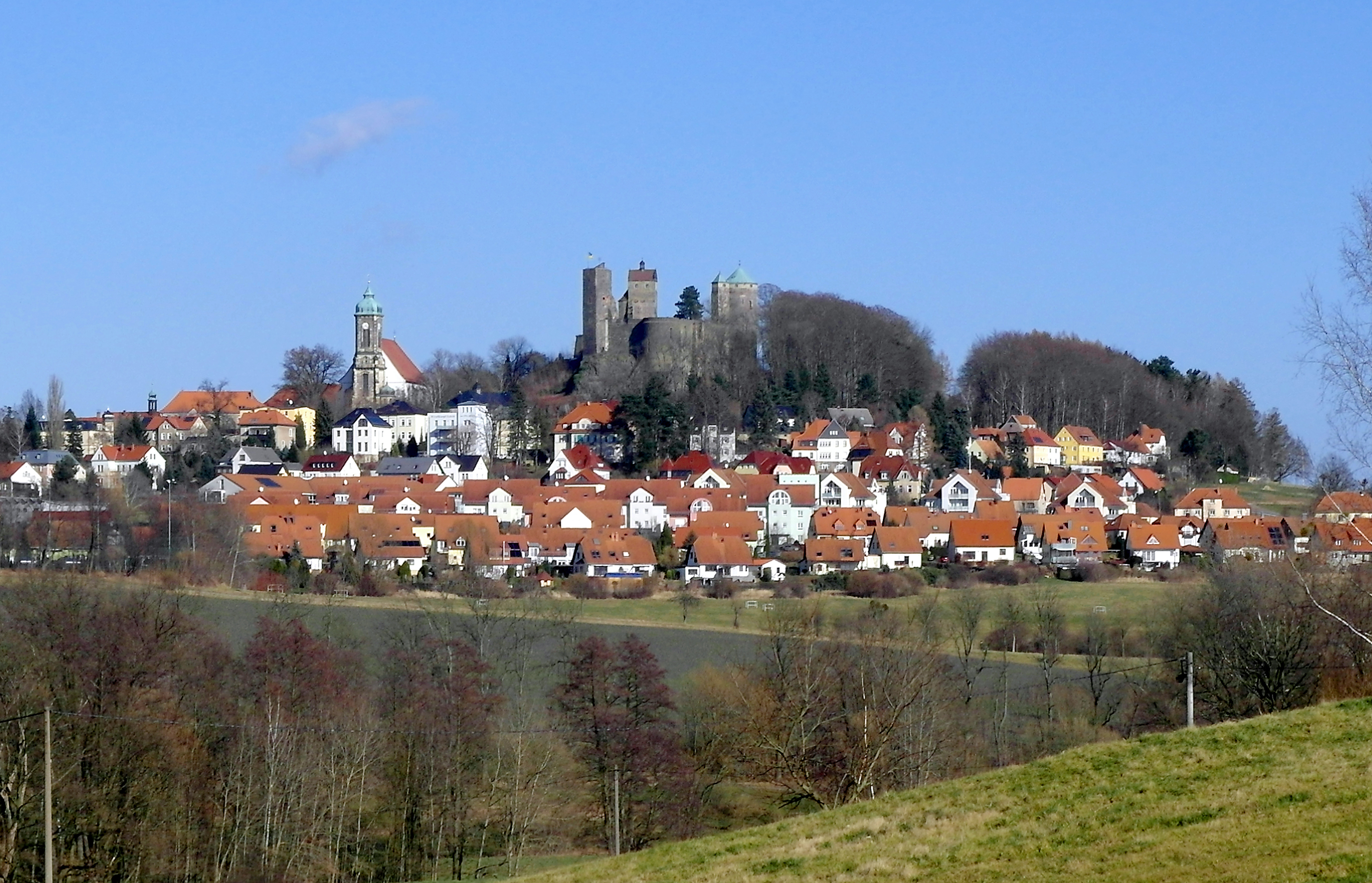 16.02.2018 01833 Stolpen: Stadtpanorama, Sicht von Südwesten. Rechts die Burg(GMP: 51.047984,14.083651), im Wesentlichen aus dem 15. und 16. Jh., 1675 von Wolf Caspar von Klengel mit Bastionen ausgestattet. Links die Stadtkirche, urspr. Spätgotik (1490), später stark verändert, Turm 1898/99 (GMP: 51.048311,14.082305). [SAM4016.JPG]20180216205DR.JPG(c)Blobelt